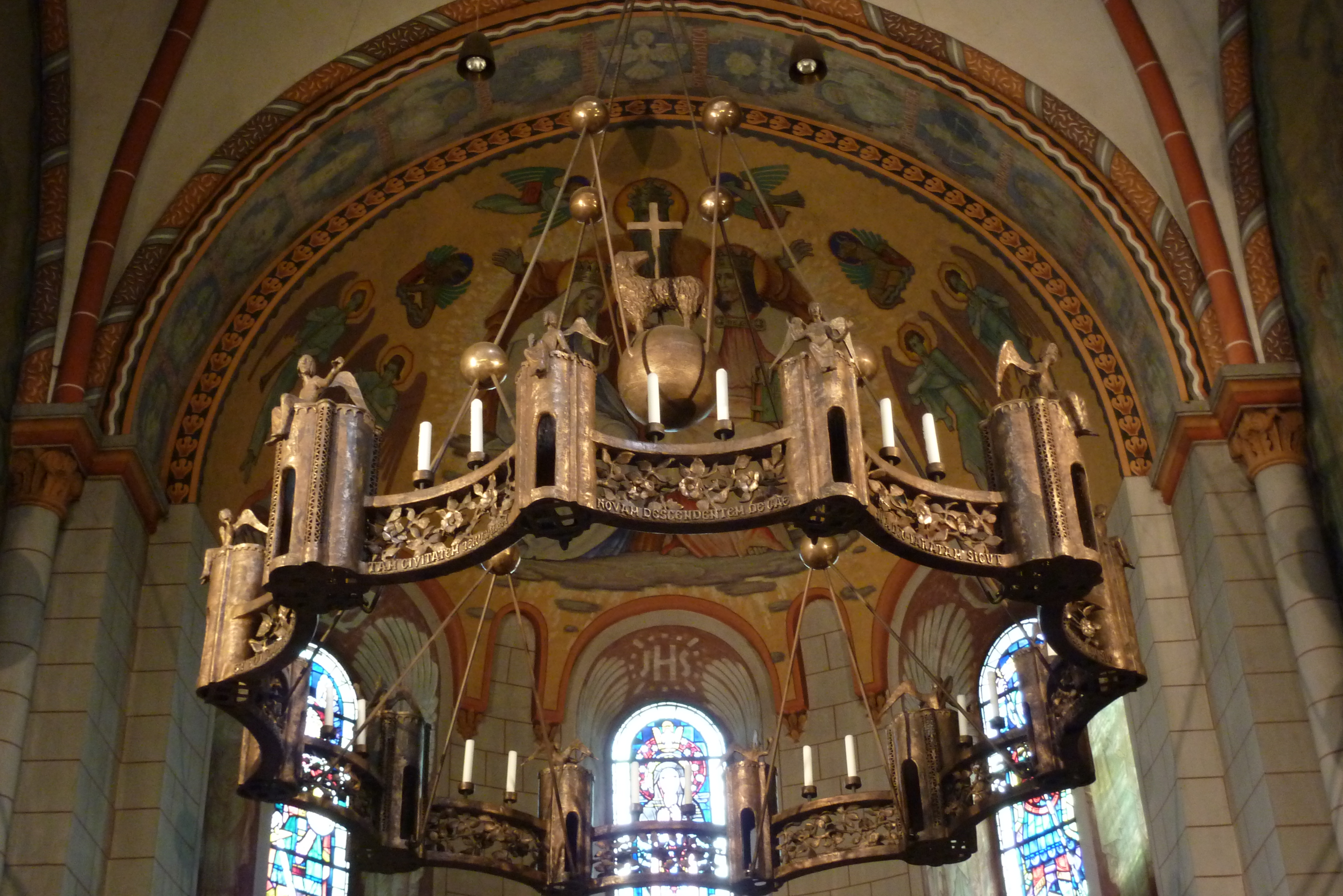 Leuchter in der Liebfrauenkirche in Andernach